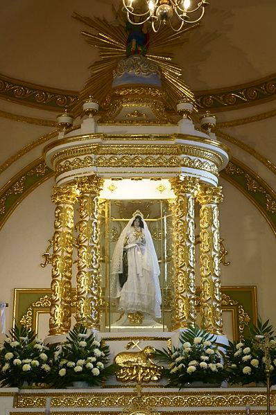 santa catalina de alejandria. santa catarina, tepoztlan